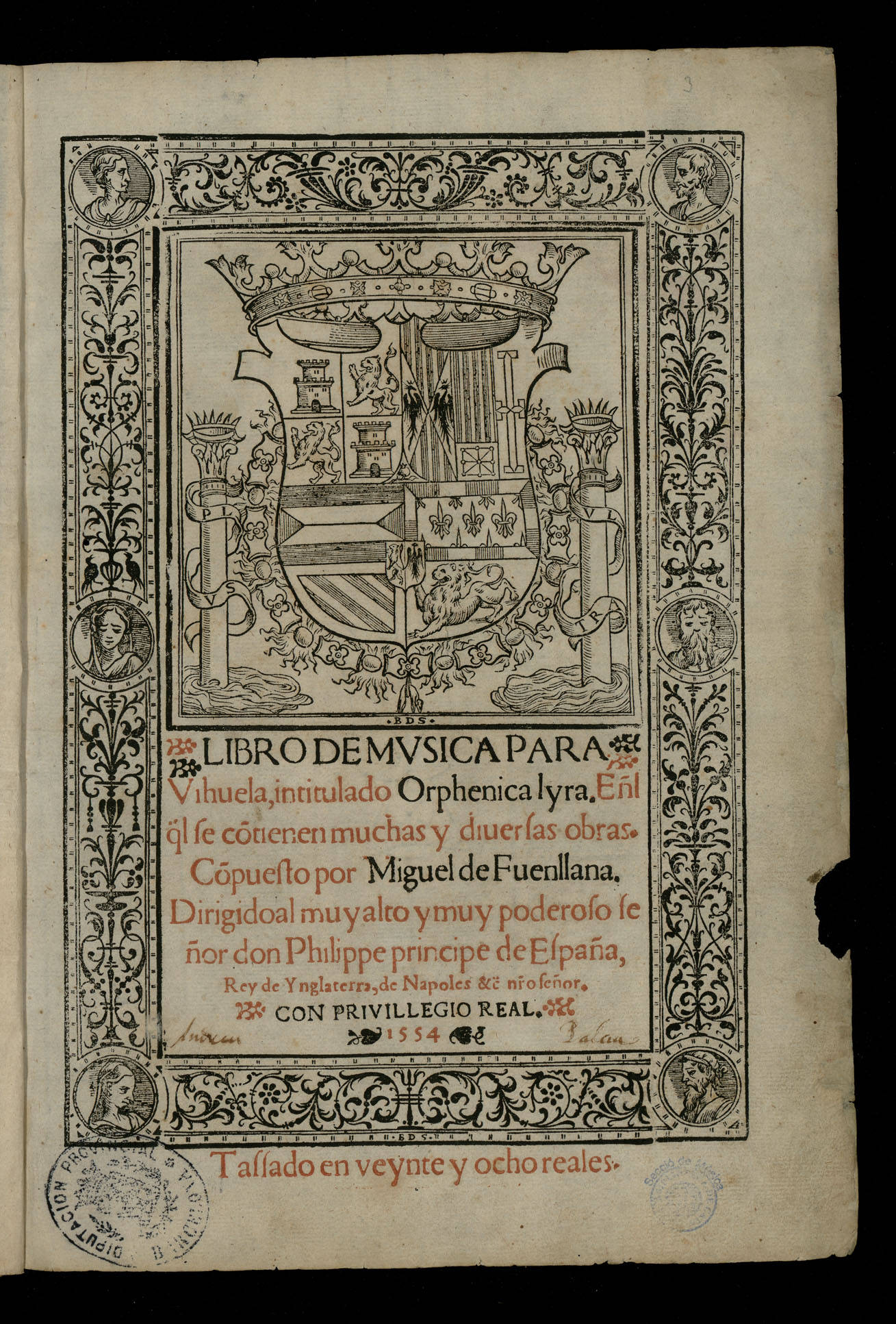 Portada del tractat de viola de mà de Miguel de Fuenllana, Orphenica lyra (Sevilla, 1554)